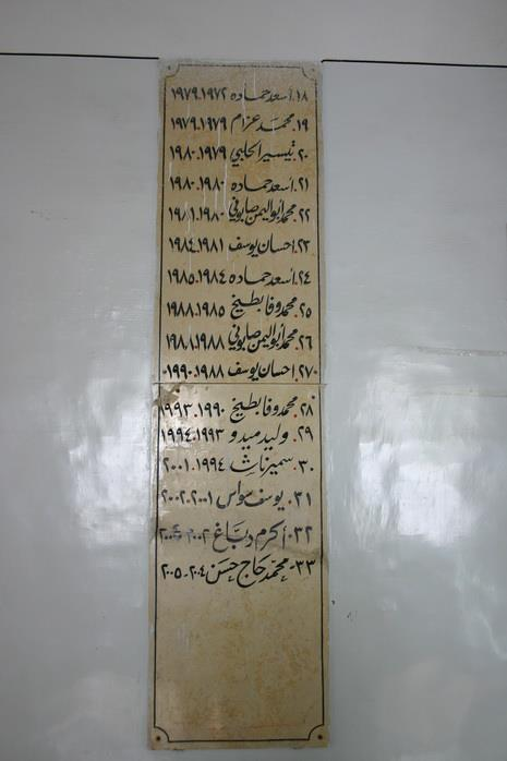 List of Mangers of AlMamoon School in Aleppo